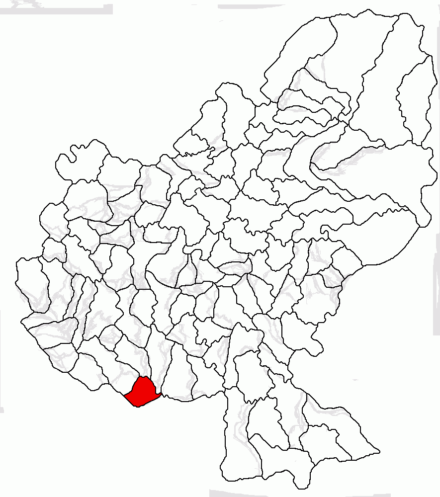 Categorie:Hărţi ale judeţului Mureş